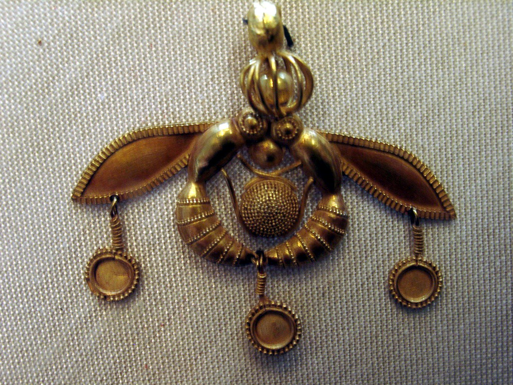 Les abeilles de Malia 1800-1700 av. J-C - Deux abeilles déposant une goutte de miel